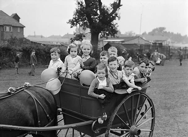 Teitl Cymraeg/Welsh title: Parti plant ffatri Sentinel, yr Amwythig Ffotograffydd/Photographer: Geoff Charles (1909-2002) Dyddiad/Date: September 9/9/1950 Cyfrwng/Medium: Negydd ffilm / Film negative Cyfeiriad/Reference: (gch00895) Rhif cofnod / Record no.: 3367430 Rhagor o wybodaeth am gasgliad Geoff Charles yn Llyfrgell Genedlaethol Cymru More information about the Geoff Charles Collection at the National Library of Wales Mae ffotograffau Geoff Charles hefyd yn rhan o Broject Europeana Libraries Geoff Charles' photographs also form part of the Europeana Libraries Project